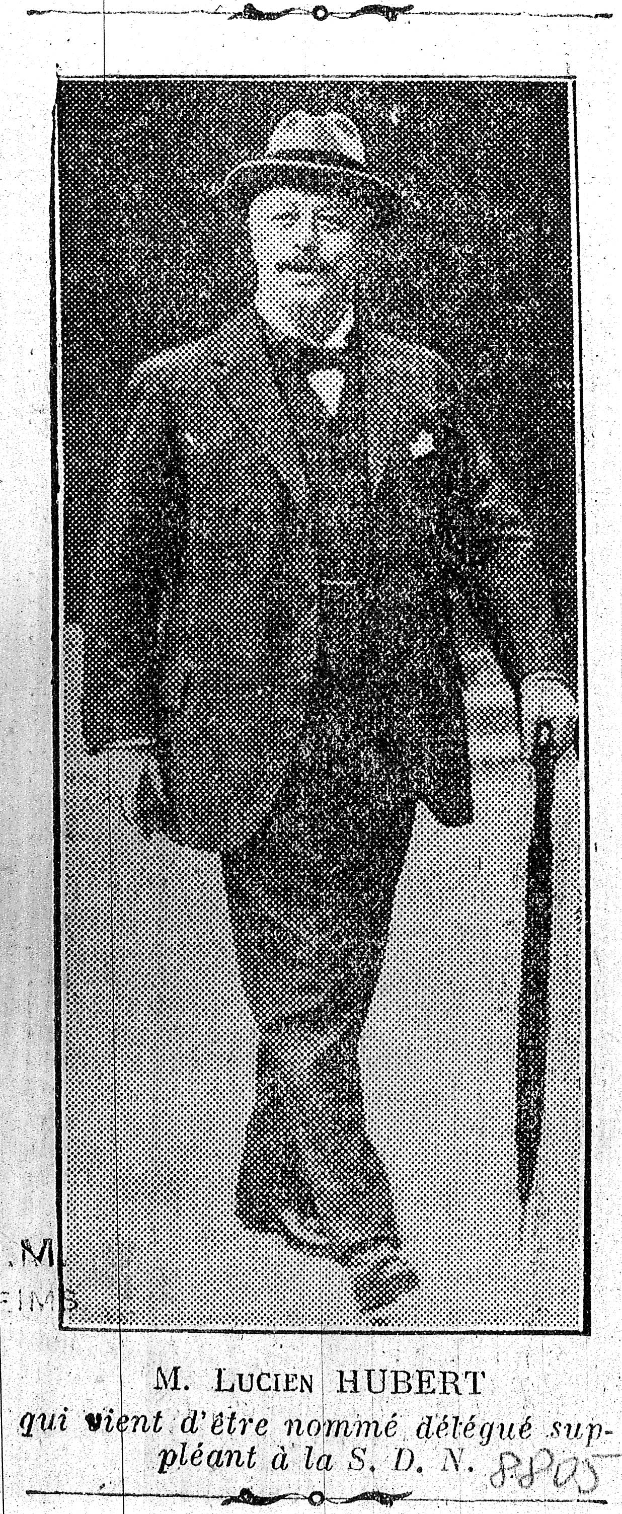 issu du fond iconographique de la bibliothèque de Reims, microfilm 94.